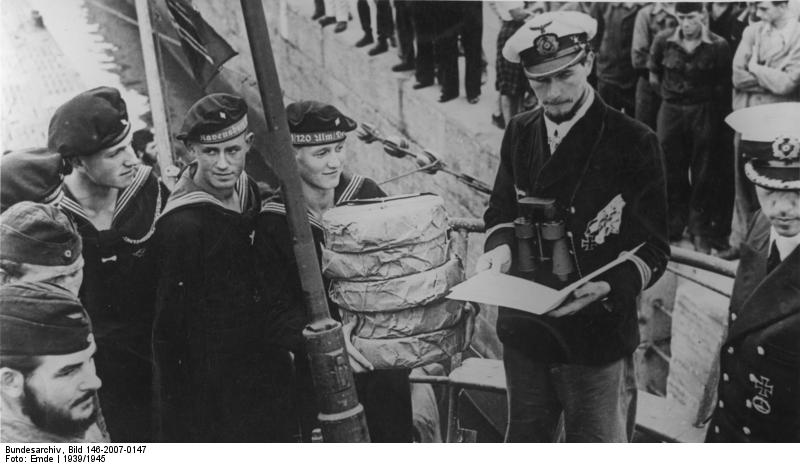 Marine-Hitler-Jugend besucht U-Bootkämpfer in einem Einsatzhafen am Atlantik und überreicht ihnen 3000 eigenhändig gesammelte Schallplatten Aufn. Emde 61182-1 Presse-Hoffmann